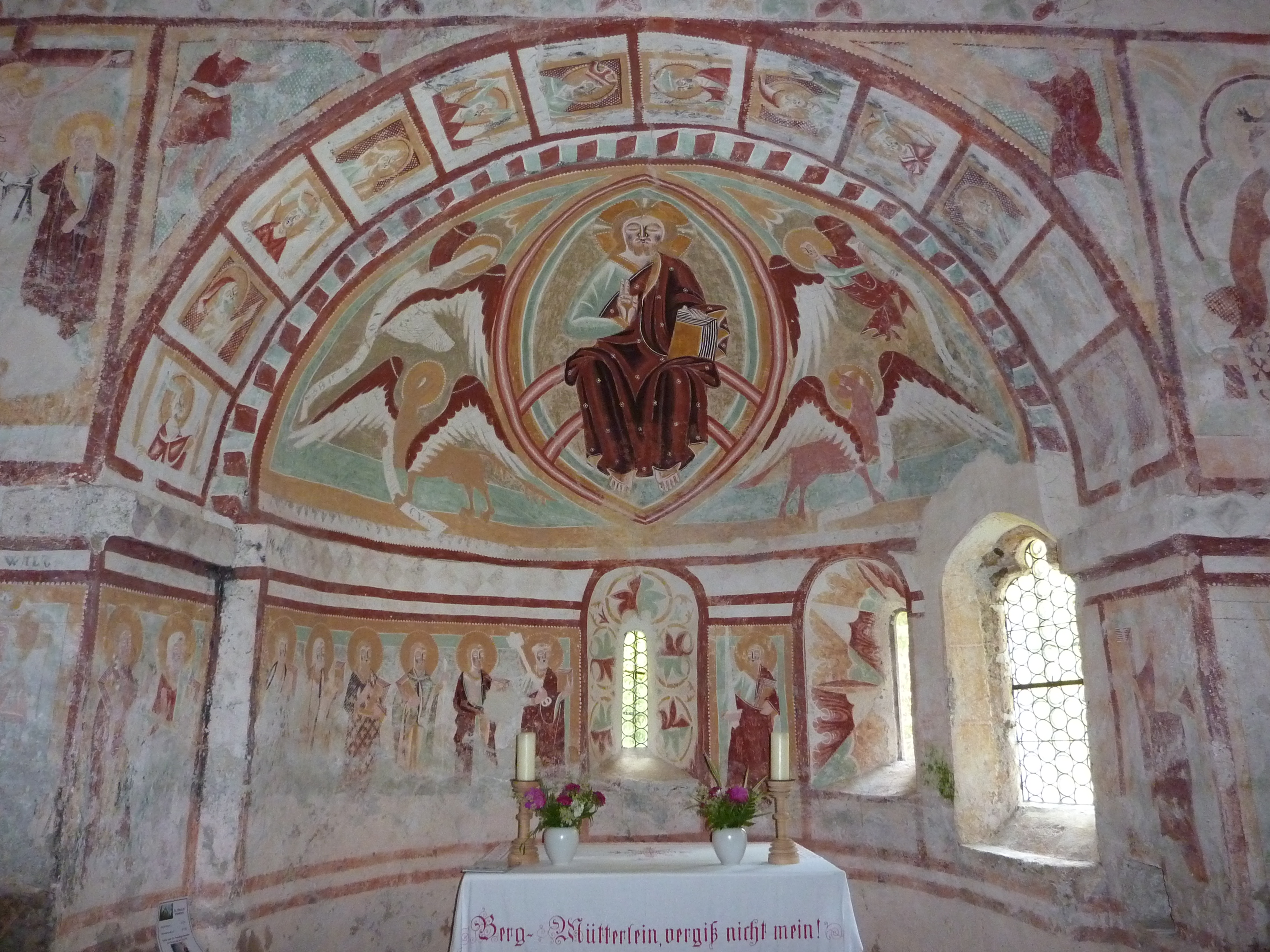 Filialkirche St. Helena, Wieserberg, Dellach im Gailtal, Kärnten - Apsis innen